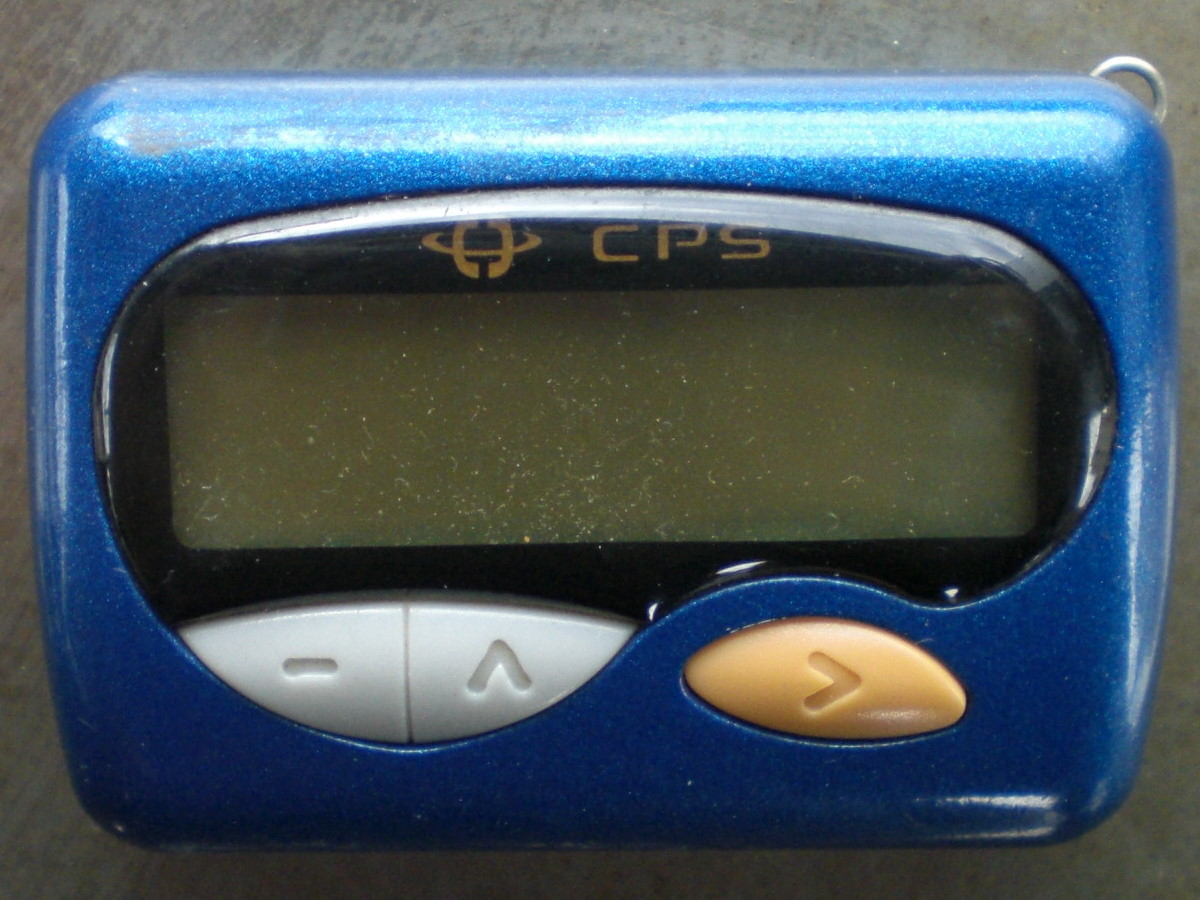 1990年代中華國際傳呼藍色呼叫器。